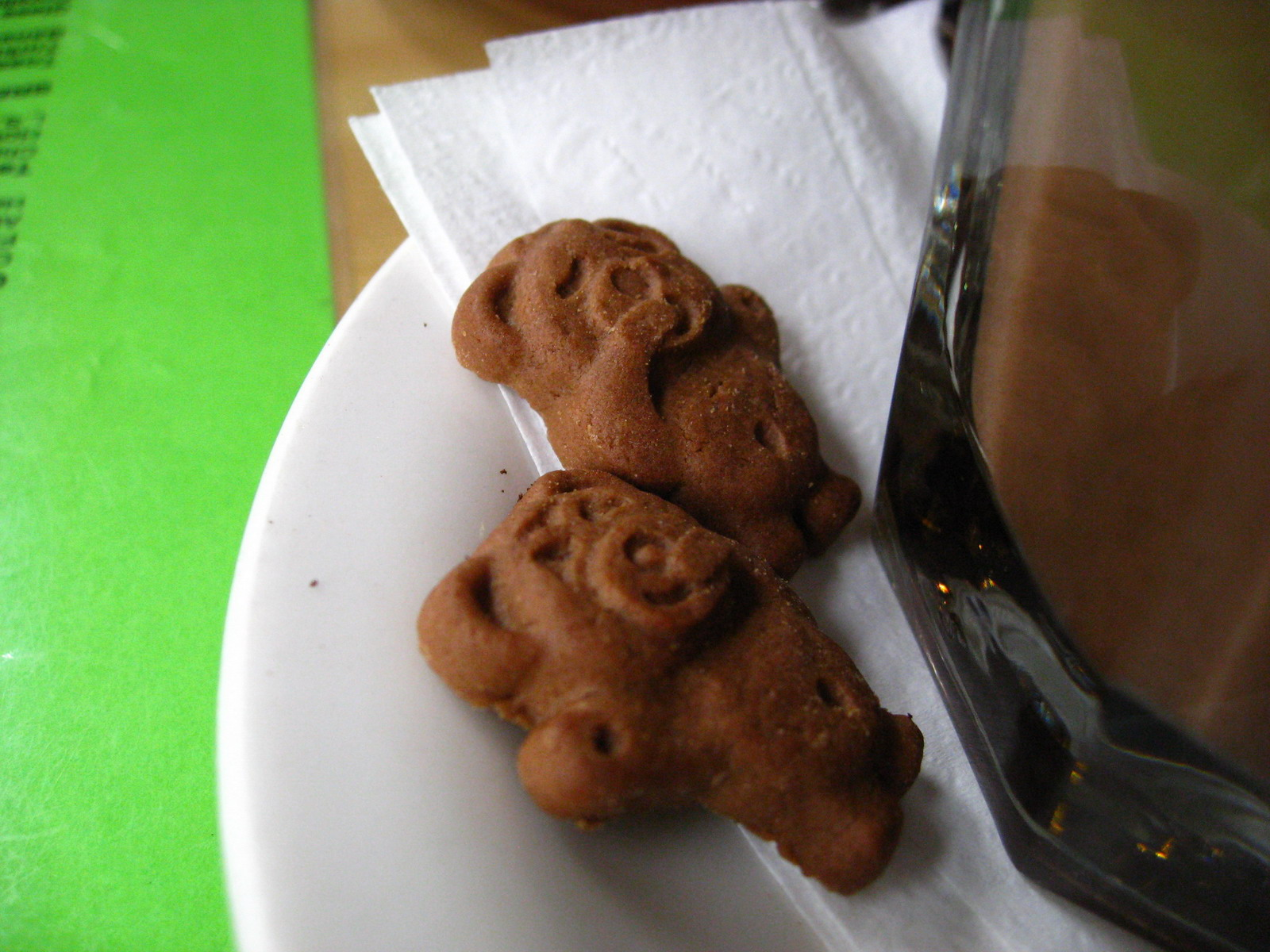 Tiny teddy cookies